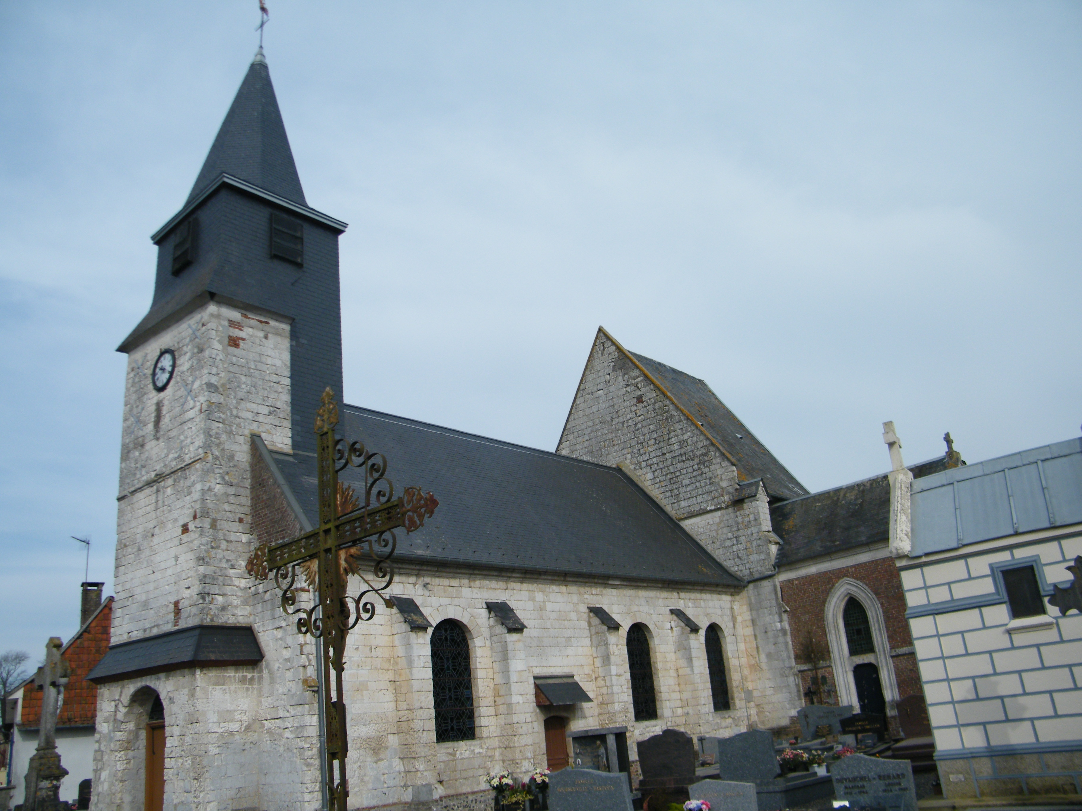 L'église.